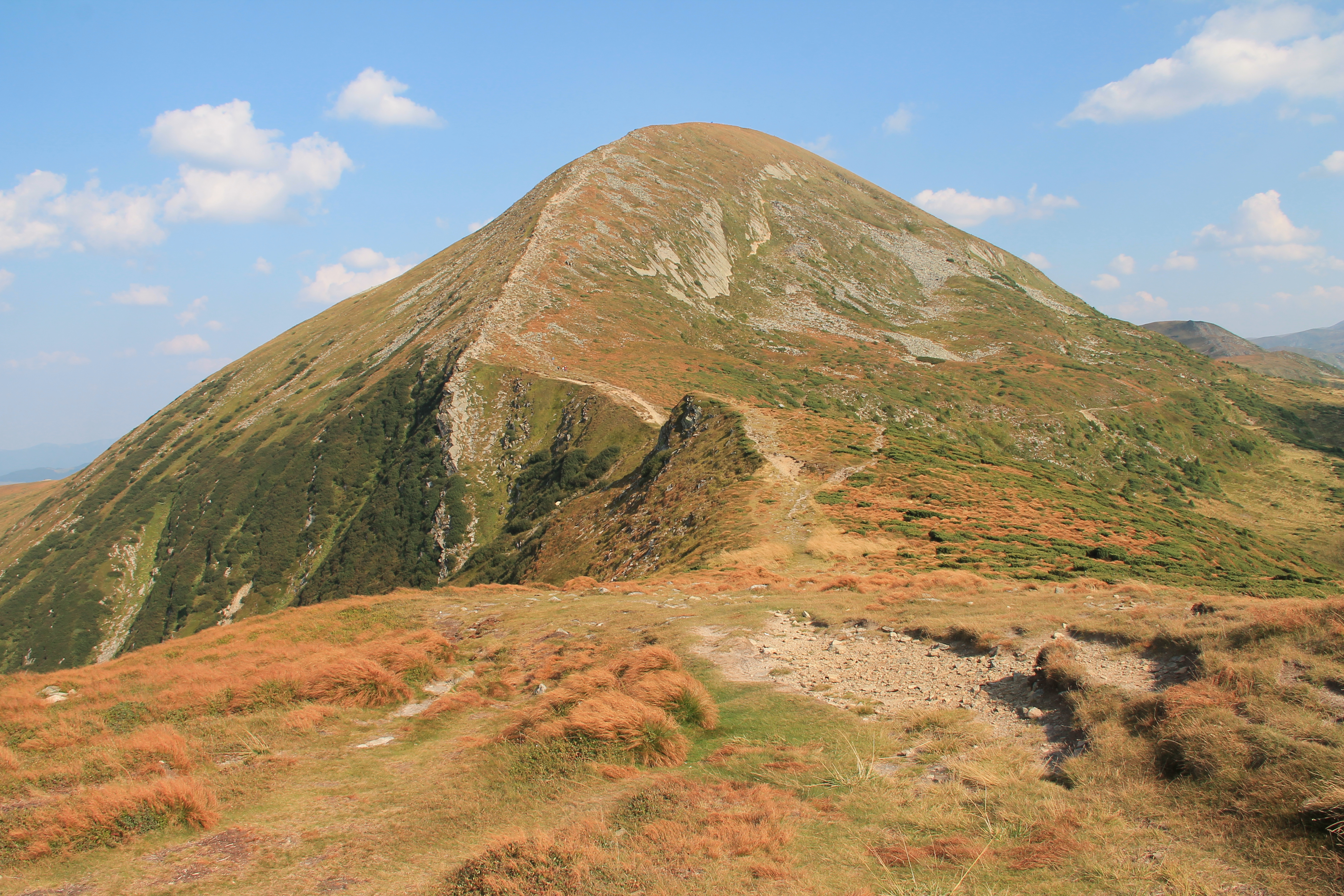 гора Гове́рла — найвища вершина Українських Карпат і найвища точка України, висота 2061 м.